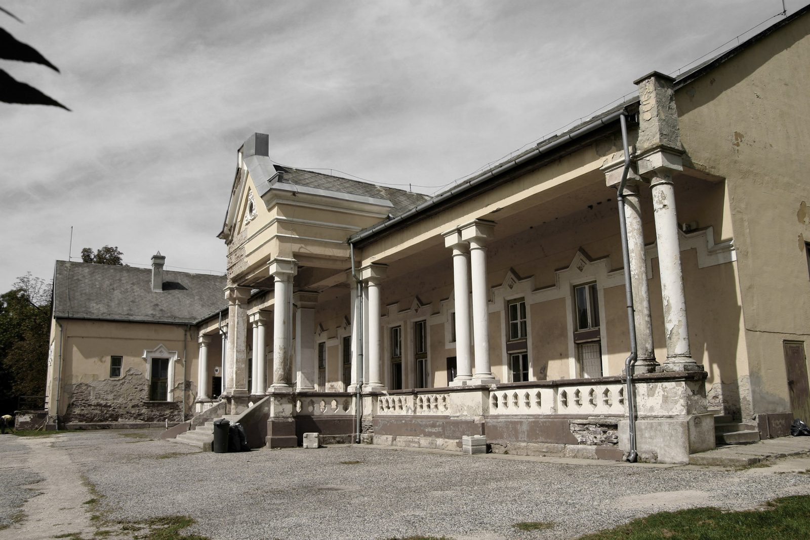 volt Zichy-kúria (Zichyújfalu, Kastélykert)